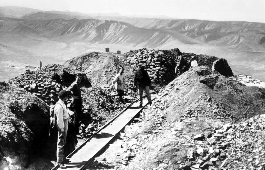 А. Е. Ферсман на руднике Тюя-Муюн